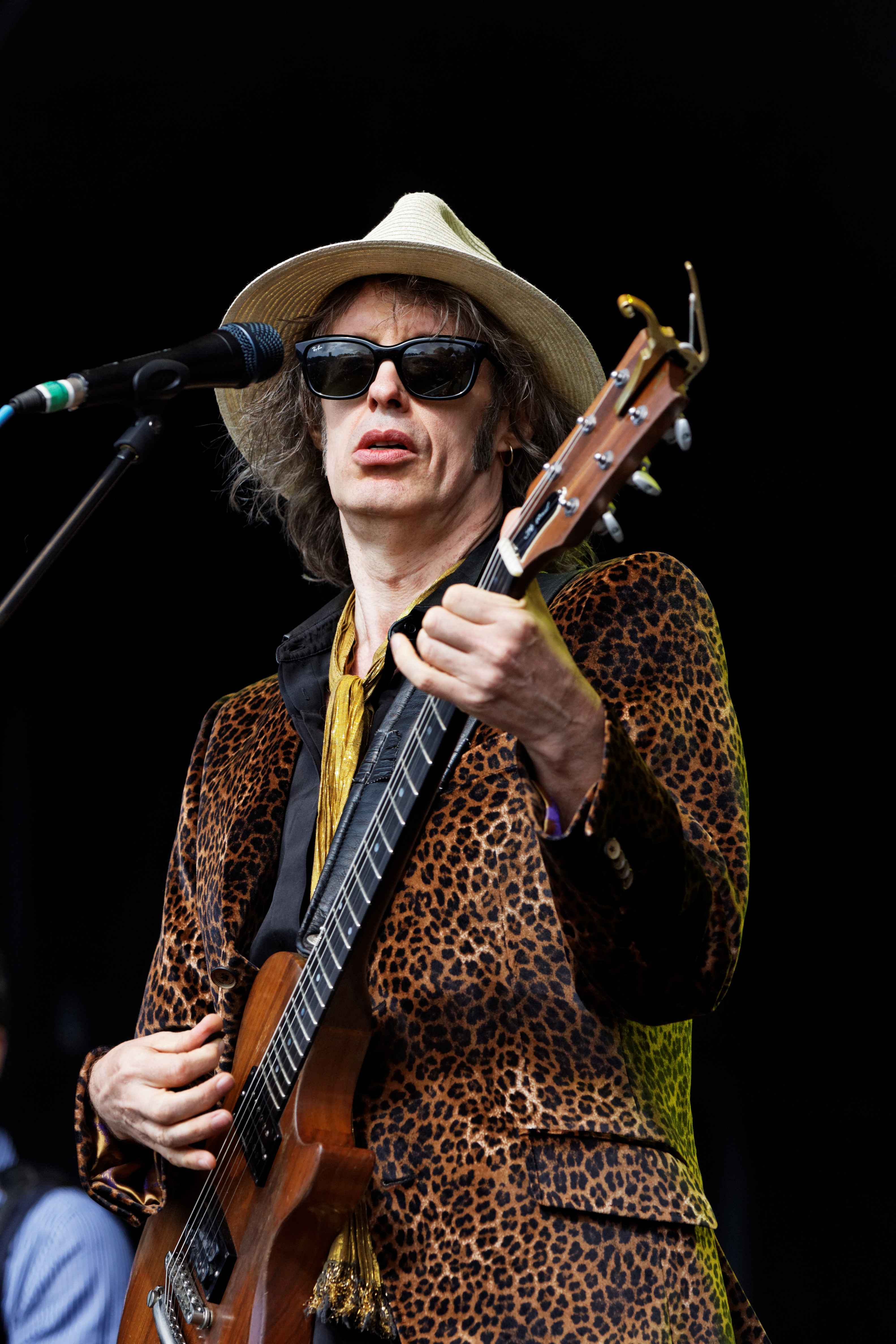 The Waterboys en concert sur la scène Landaoudec lors du festival du bout du Monde à Crozon dans le Finistère (France).